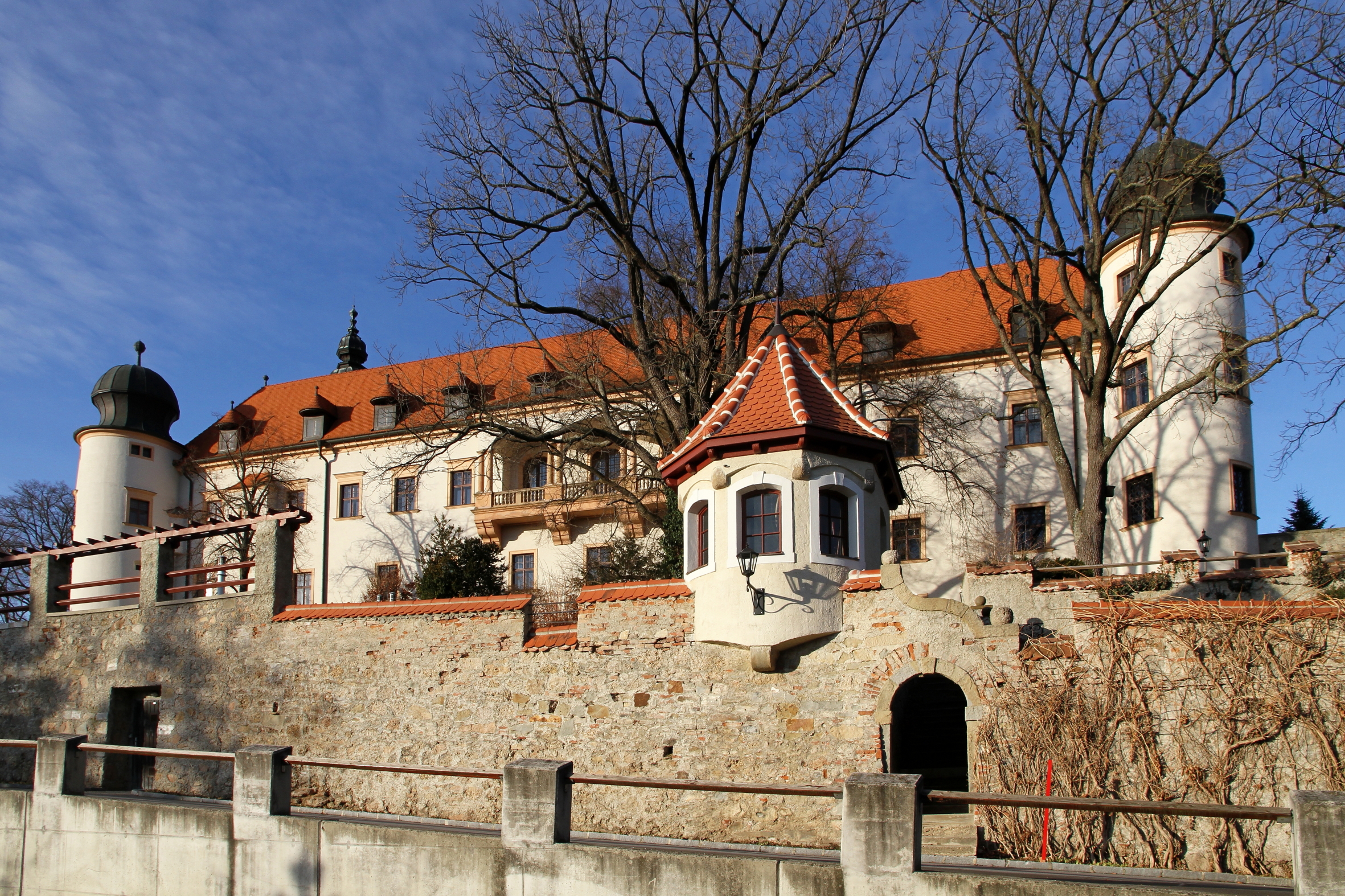 Südansicht des Schlosses Sitzenberg in der niederösterreichischen Gemeinde Sitzenberg-Reidling.